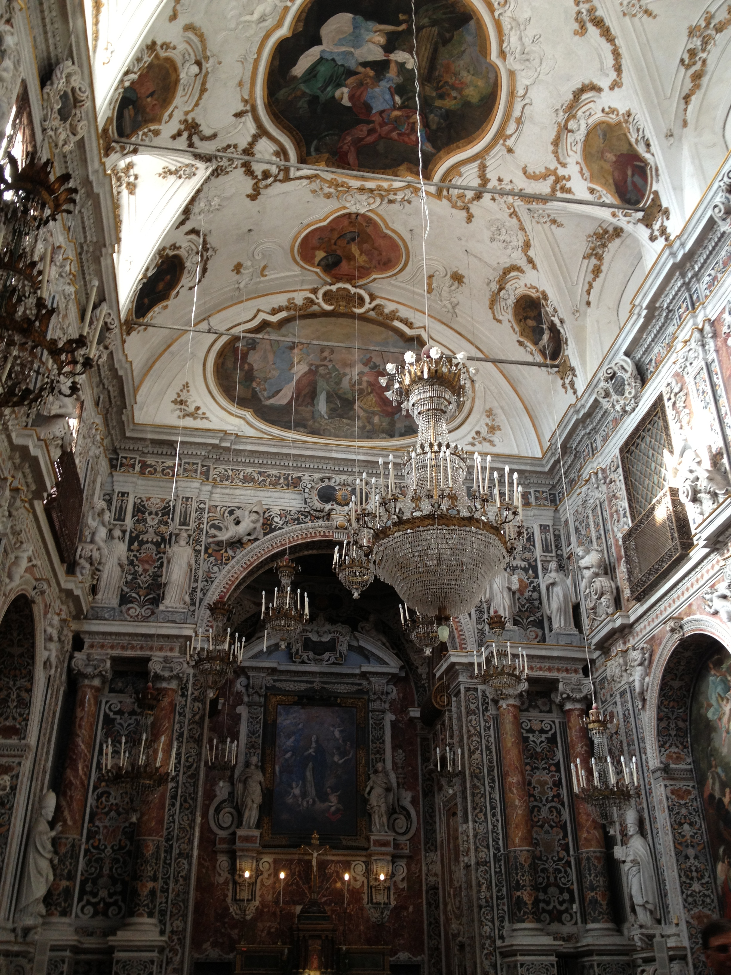 Chiesa dell'Immacolata Concezione al Capo